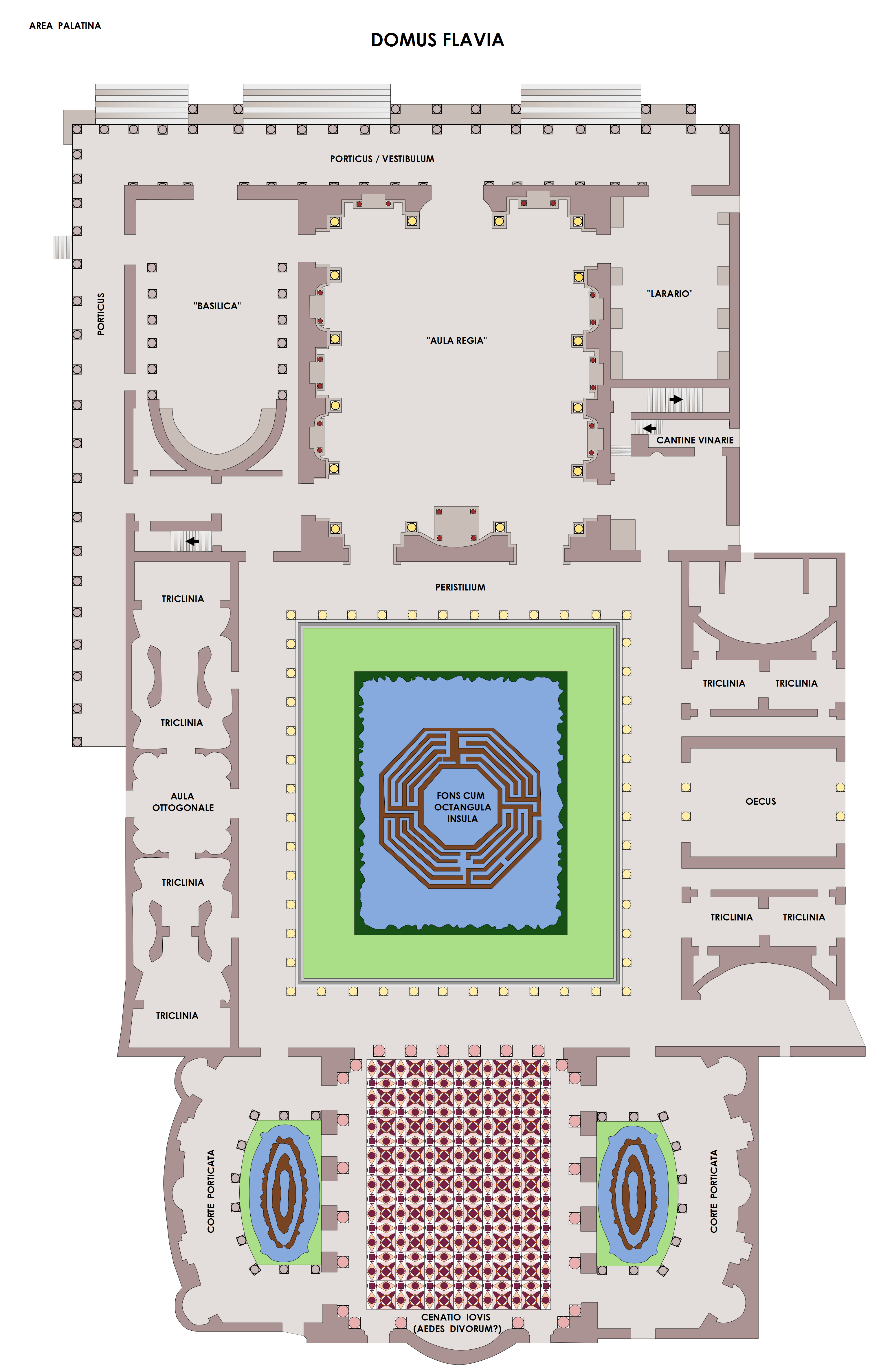 Pianta della Domus Flavia di Domiziano (Roma - Palatino; 81-92 AD); architetto Rabirio.